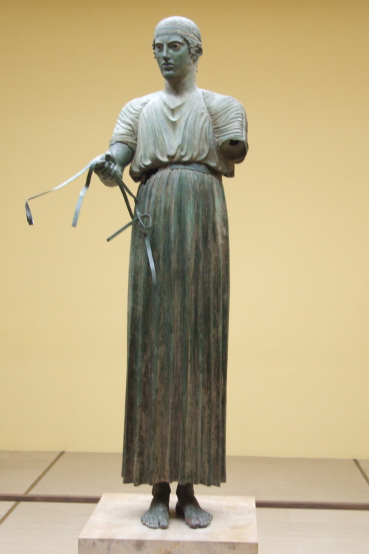 Museum Delphi Wagenlenker